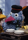 Gerrit de Postduif uit de Fabeltjeskrant